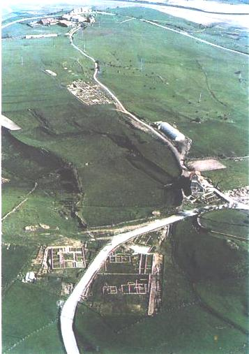 Vista área del yacimiento arqueológico de Julióbriga emplazado en el pueblo de Retortillo.